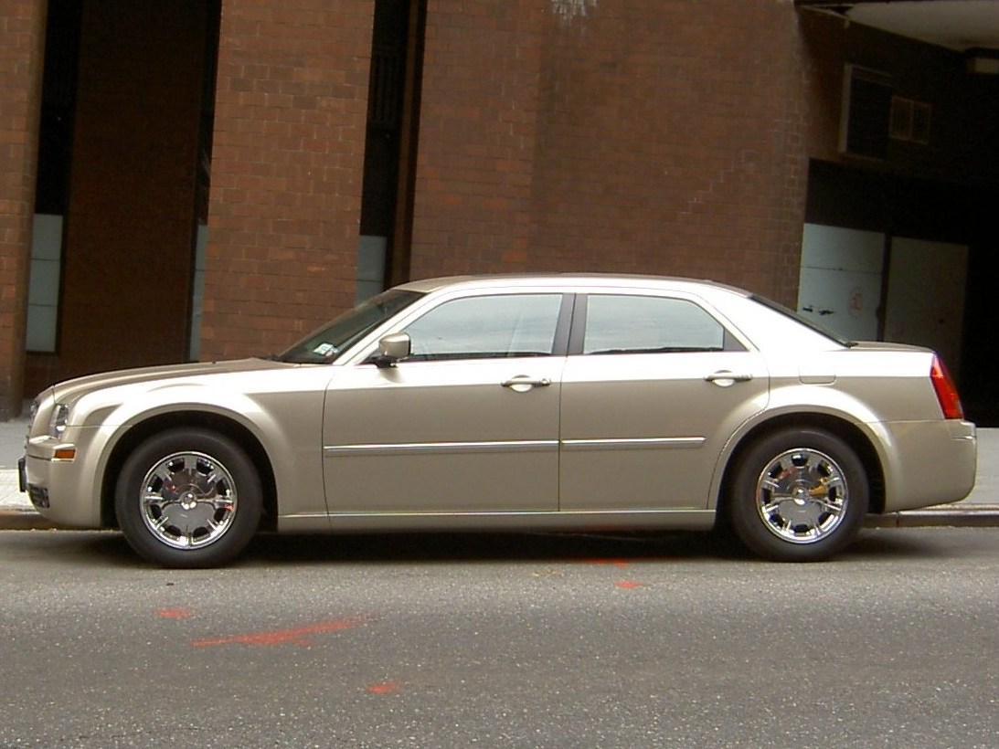 Chrysler 300, Side View